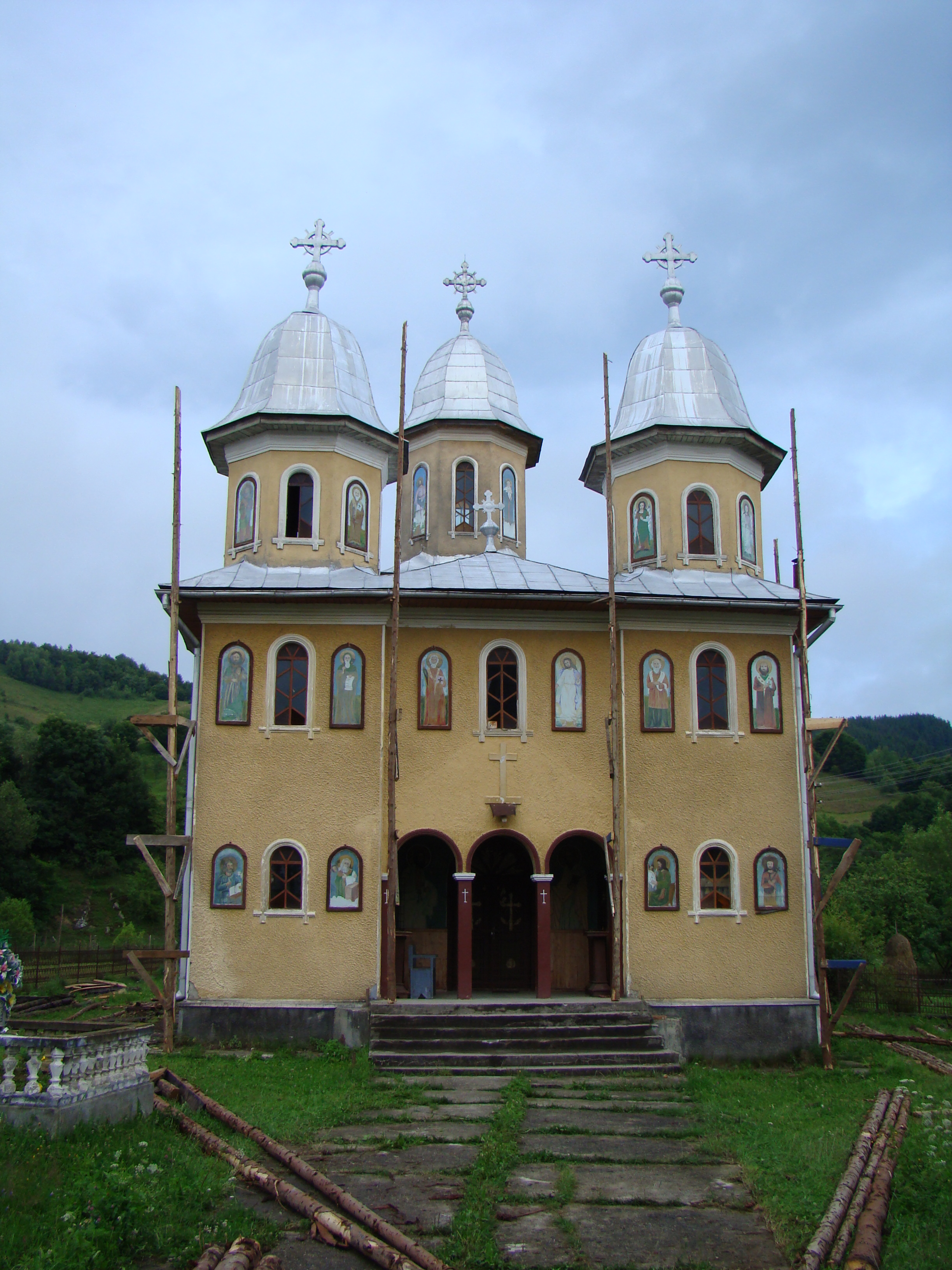 Biserica nouă din Suplai